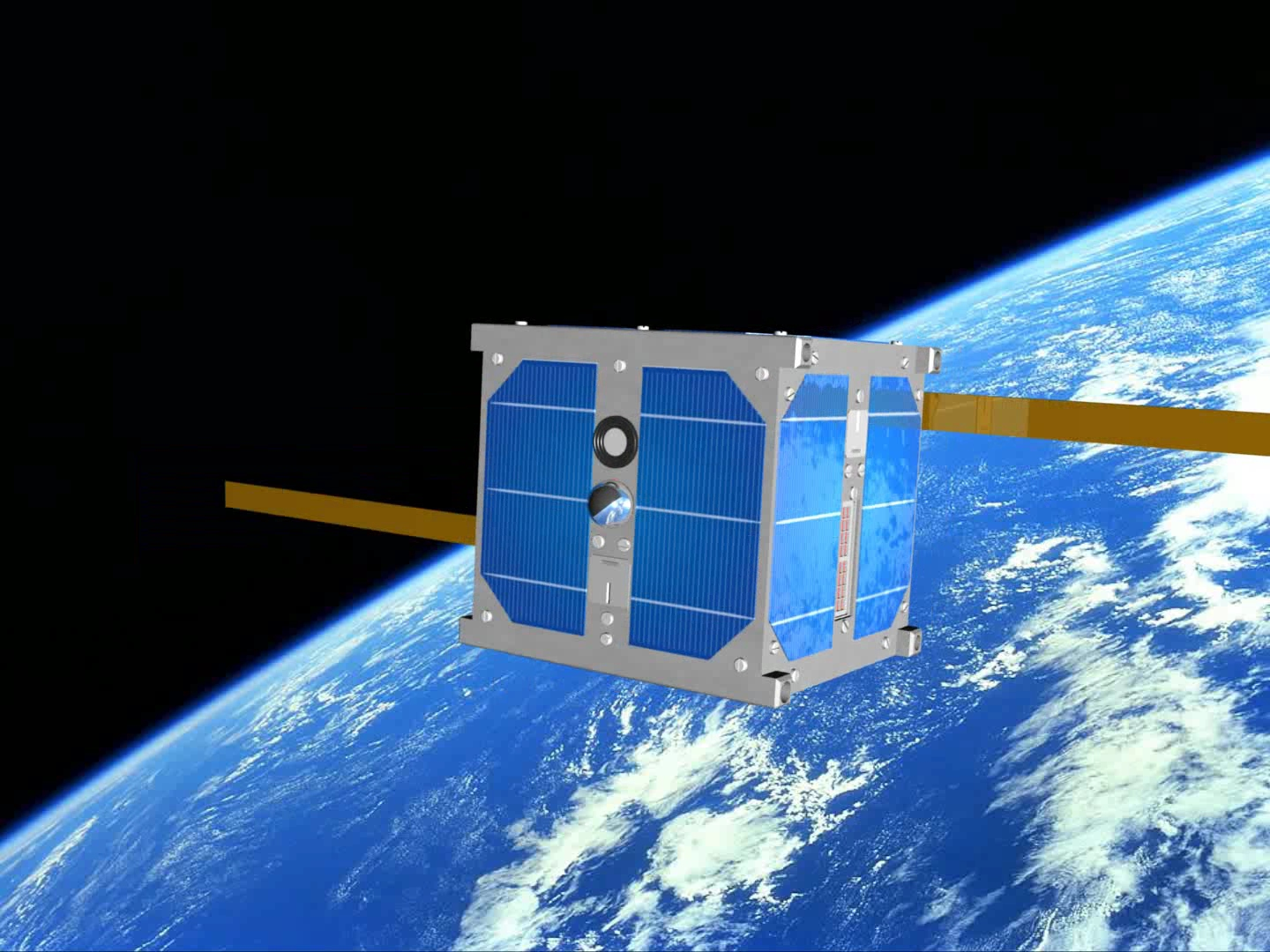 ESTCube-1 satellite.